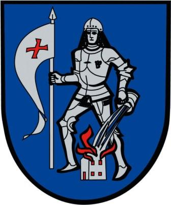 Wappen der Gemeinde Groß Sankt Florian